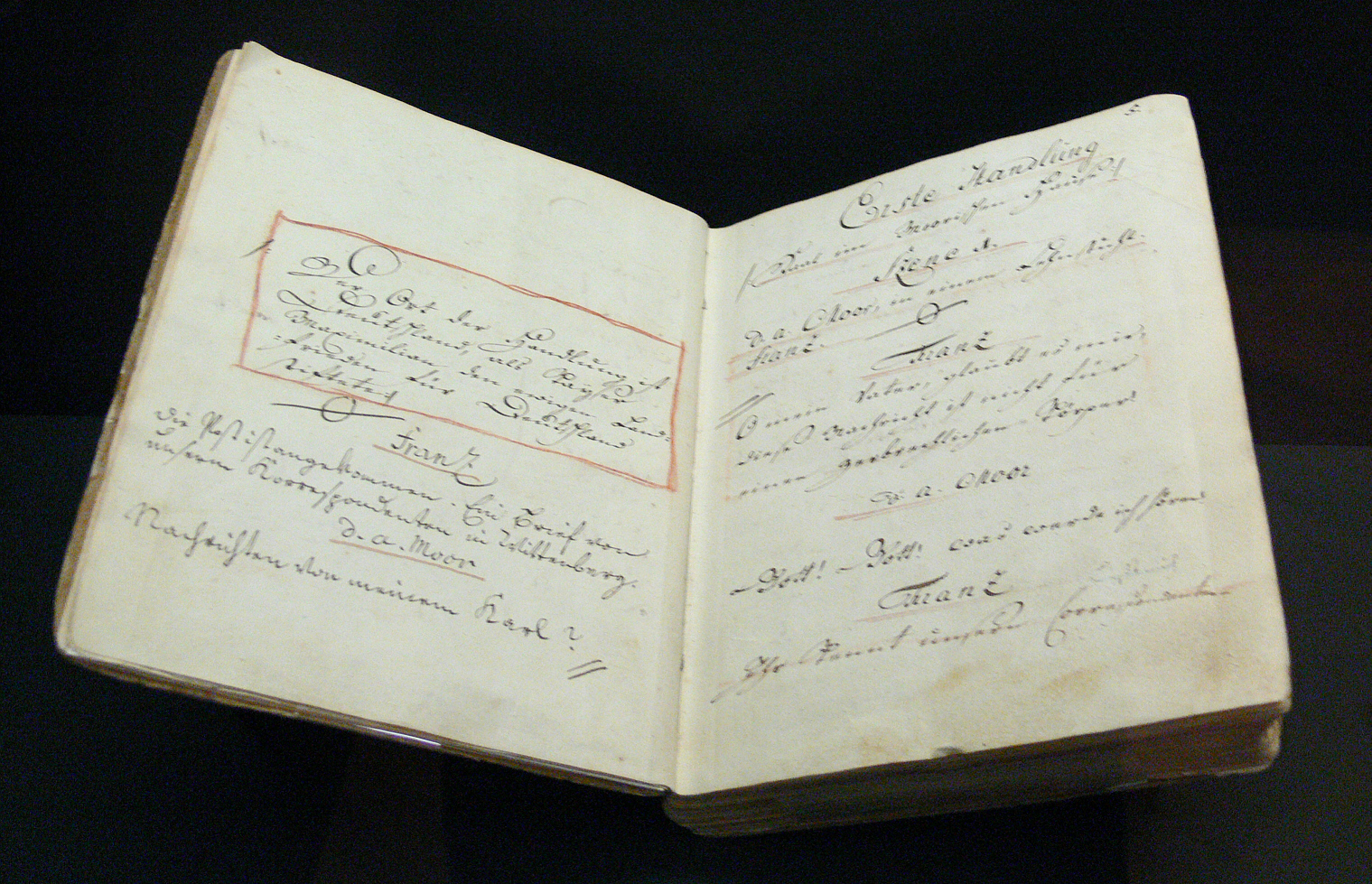 Soufflierbuch zur Uraufführung von Friedrich Schillers Die Räuber am 13. Januar 1782 in Mannheim, entstanden durch Souffleur Johann Daniel Trinkle, 1781/1782 Collection: Reiss-Engelhorn-Museen, Mannheim